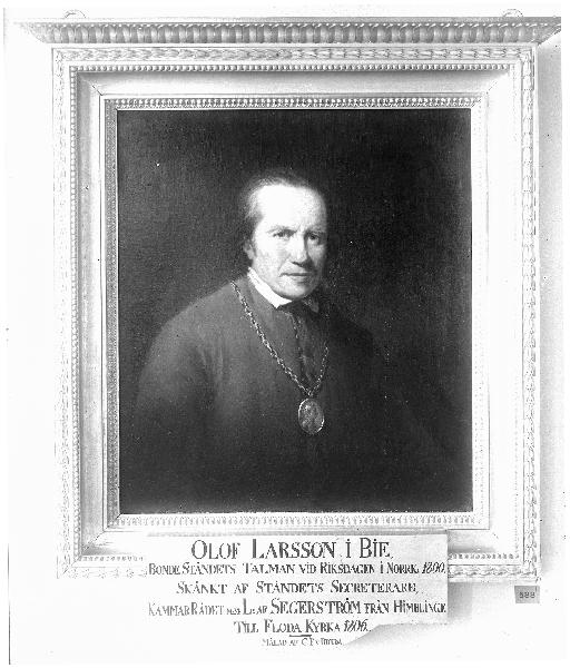 Porträtt föreställande Olof Larsson i Bie, signerat Carl Fredrik von Breda 1800. Kategori: (09) Porträtt Porträtt föreställande Olof Larsson i Bie, signerat Carl Fredrik von Breda 1800.